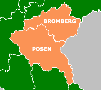 Regierungsbezirke in Posen 1878